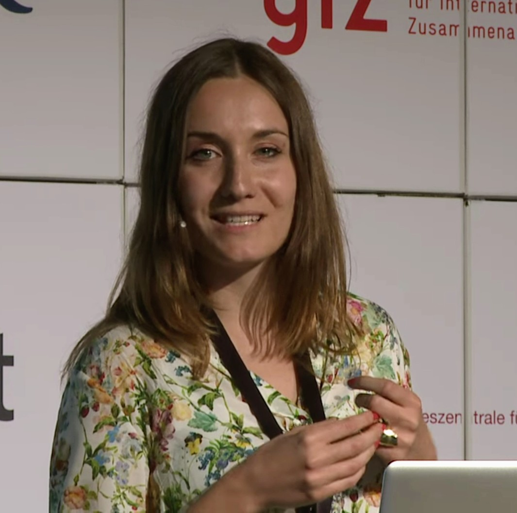 Find out more at: Der Tod ist in den sozialen Medien ein Tabuthema, eines, das berührt, und auch eines, mit dem wir uns in Zukunft auseinandersetzen müssen. Was passiert mit unseren Profilen nach unserem Tod? Wie sähe die perfekte Nachlass-App aus? Und wenn das Web so social ist, warum ist das Sprechen und Schreiben über den Tod dort immer noch eine Gratwanderung? RIP ist schnell geschrieben, wenn irgendwo auf der Welt ein Prominenter gestorben ist. Es werden Nachrufe verfasst, es wird getrauert oder zumindest eine Statusmeldung verfasst, die sagt, dass man trauert. Passiert der Tod im engen, persönlichen Umkreis, ist der Umgang damit im Social Web ein anderer. Was ist, wenn bei Facebook plötzlich das Bild eines Freundes aufpoppt, der schon gestorben ist, nur weil jemand erst jetzt die Freundschaftsanfrage angenommen hat? Wie lange bleiben Profile bestehen, auch wenn die Personen dahinter nicht mehr leben? Und was passiert mit einem Blog, wenn der Autor nicht mehr ist? Wie gehen wir mit dem Tod um in einem Web, das angeblich so sozial ist? Wie wird Tr... Elisabeth Rank | | | Creative Commons Attribution-ShareAlike 3.0 Germany (CC BY-SA 3.0 DE)